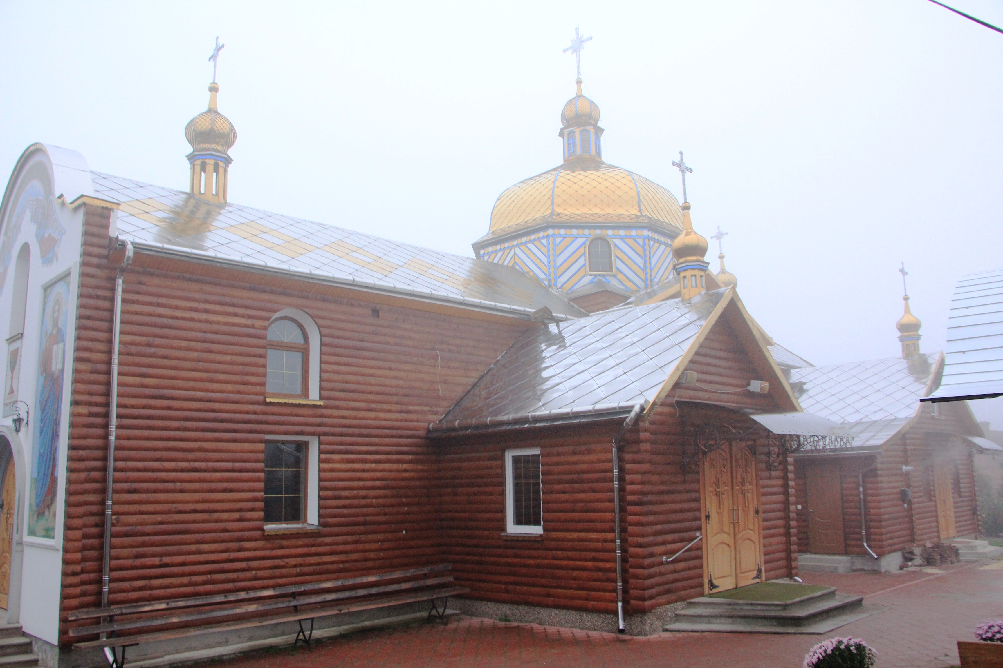 Церква св. Миколи 1782